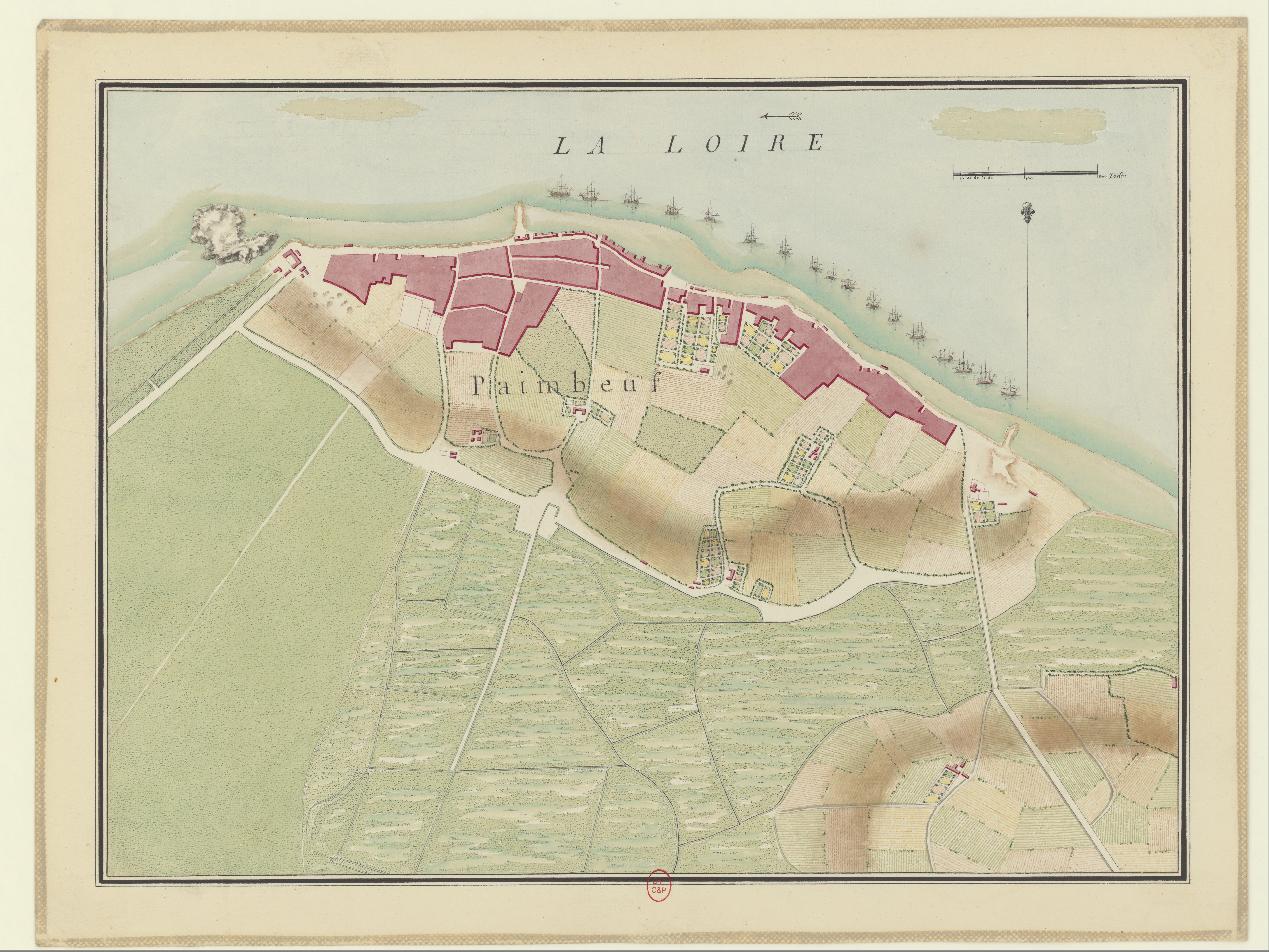 Carte du port de Paimbeuf en 1777